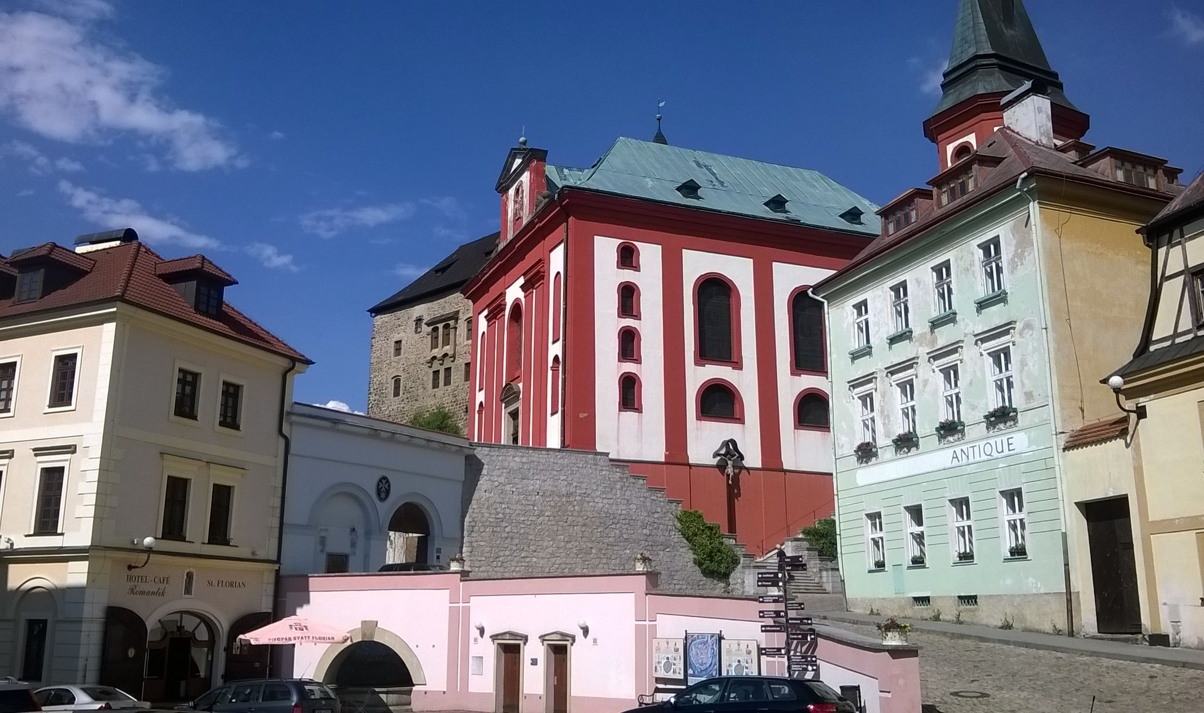 V centru města